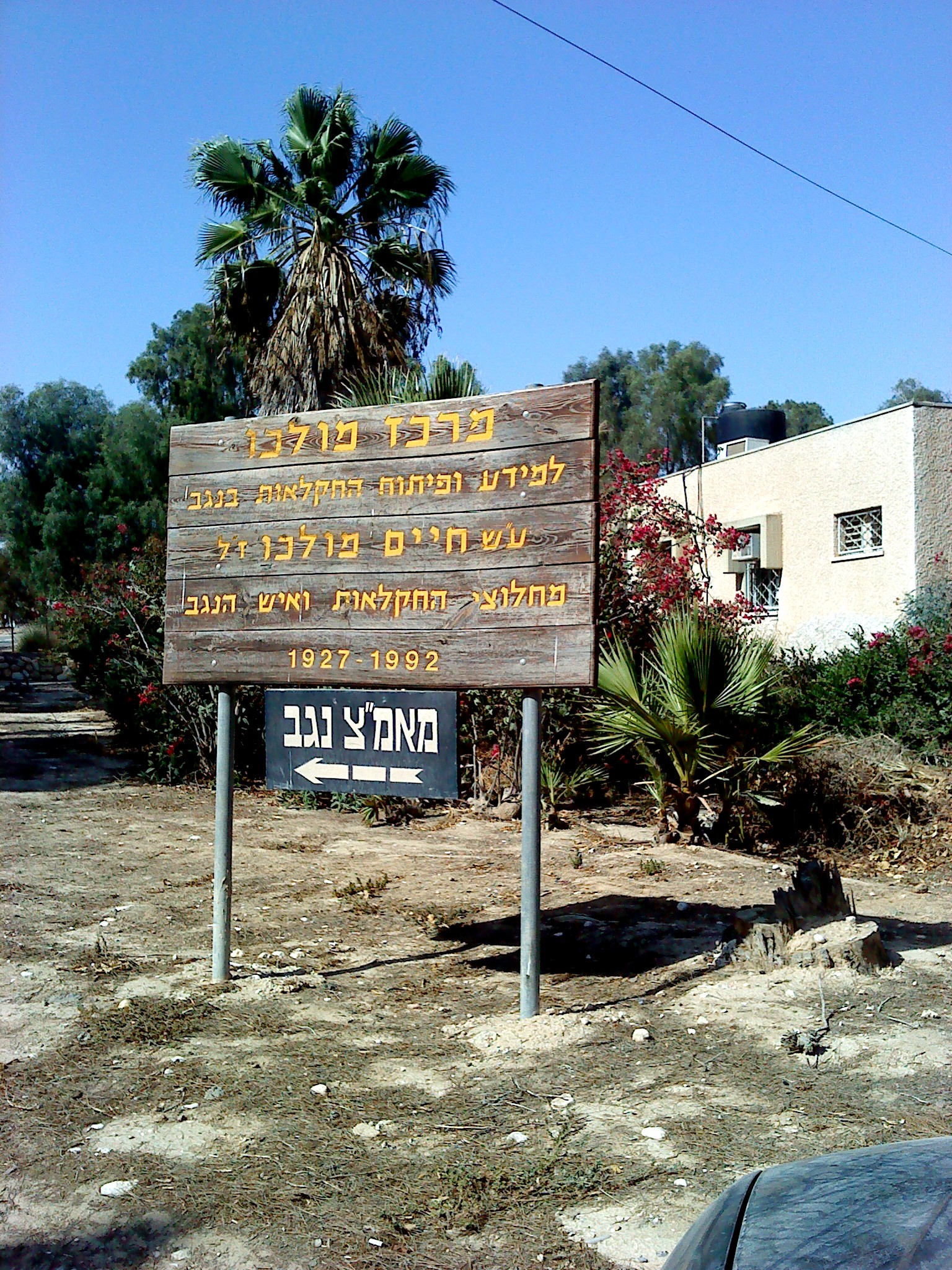 שלט בכנסיה למרכז המחקר החקלאי בגילת